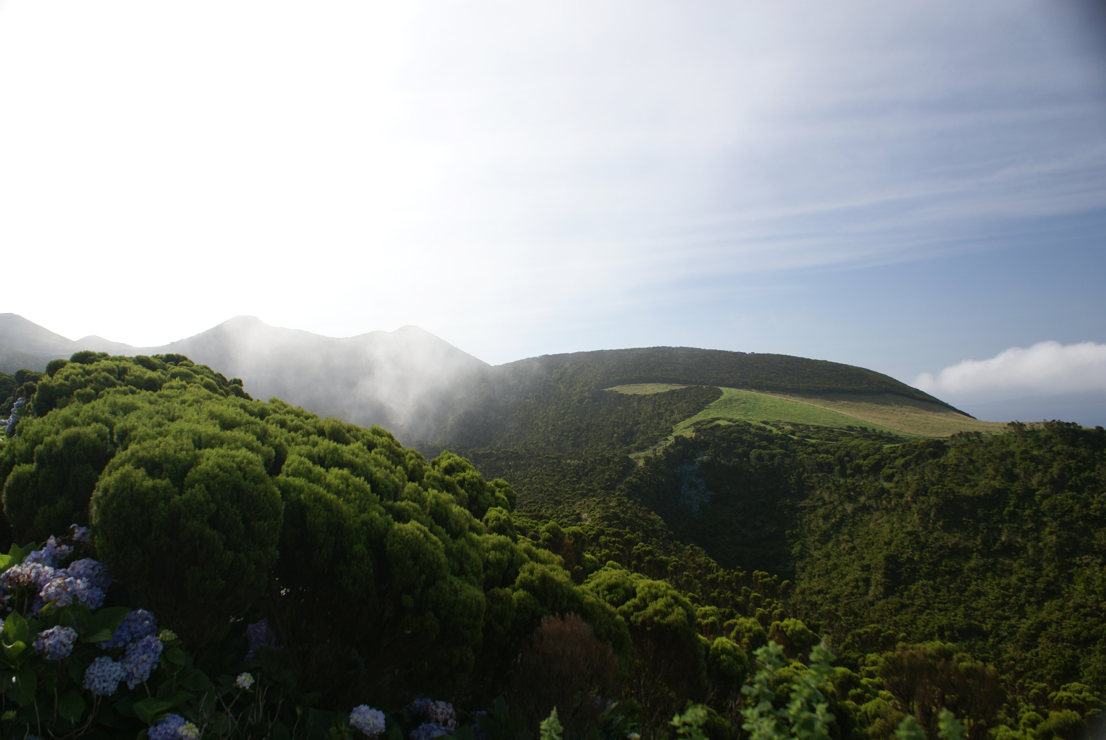 Cratera do vulcão da Urzelina, sítio localmente conhecido por “Bocas de Fogo da Urzelina”, Vista Geral, Velas, ilha de São Jorge, Açores